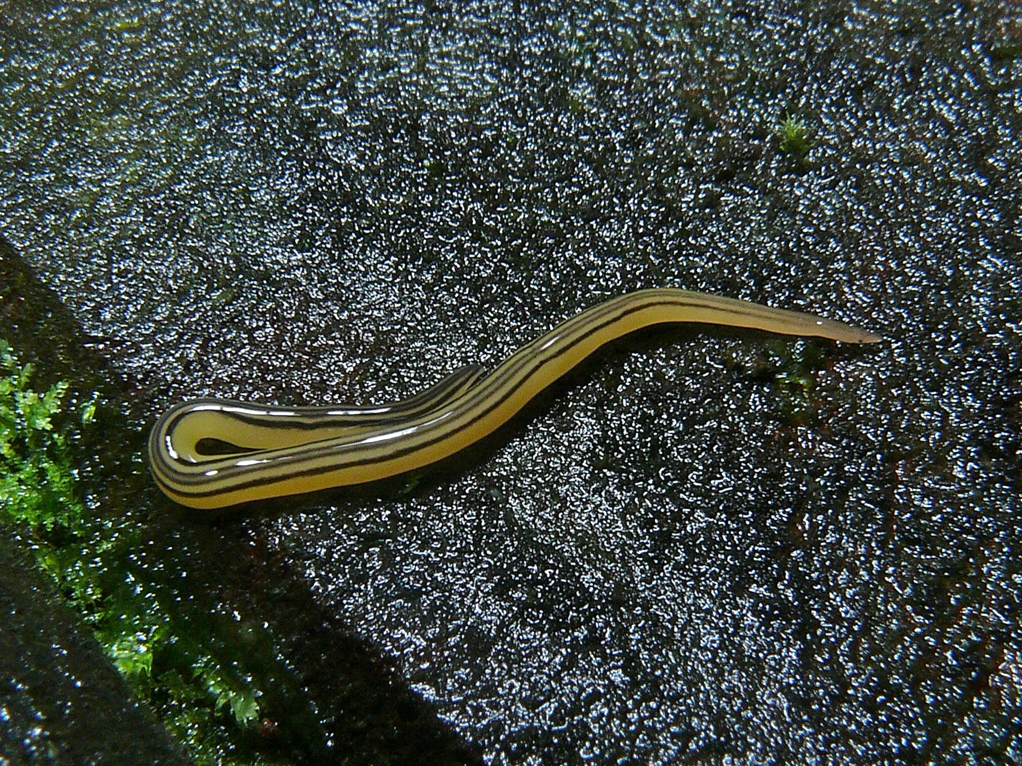 Gunung Mulu NP, Sarawak, MALAYSIA